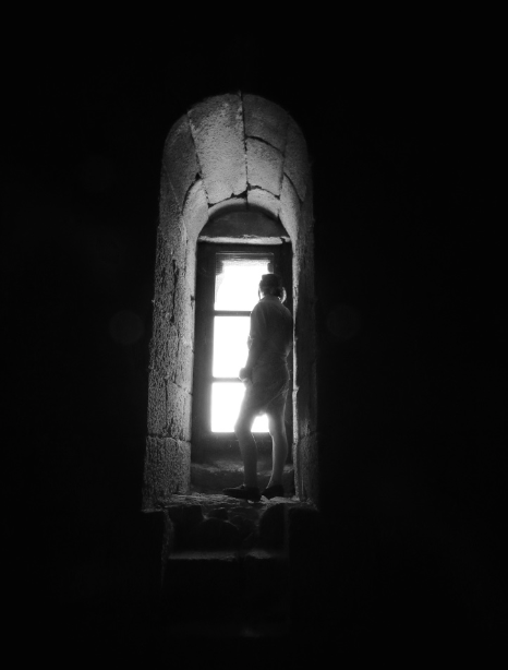 vista desde el interior